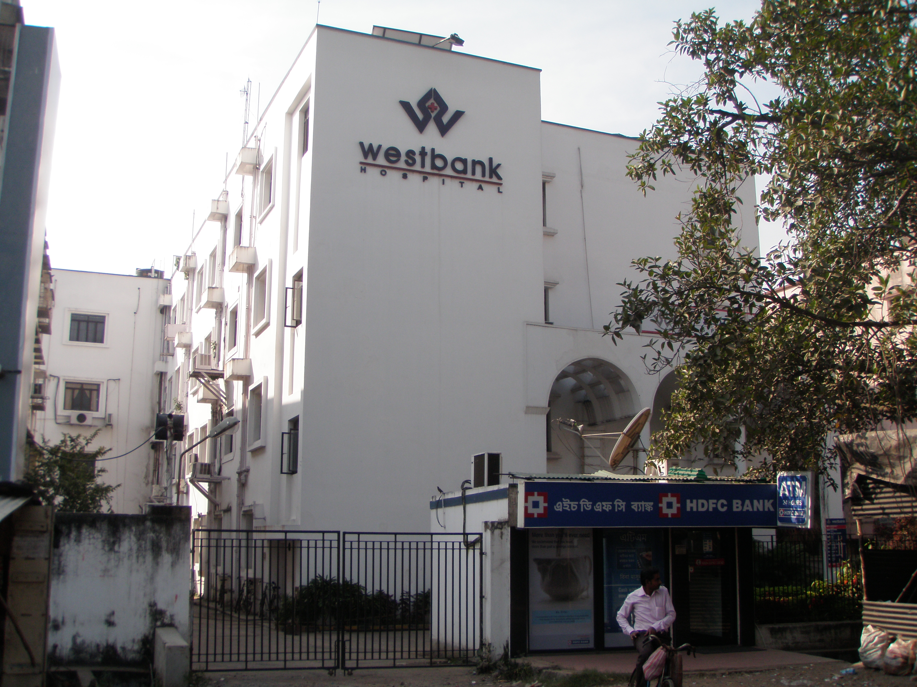 Howrah district, West Bengal